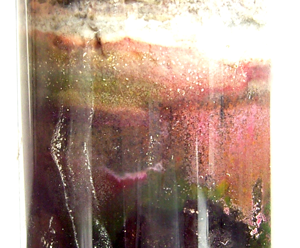 Schwefelpurpurbakterien im oberen Bereich einer Winogradsky-Säule